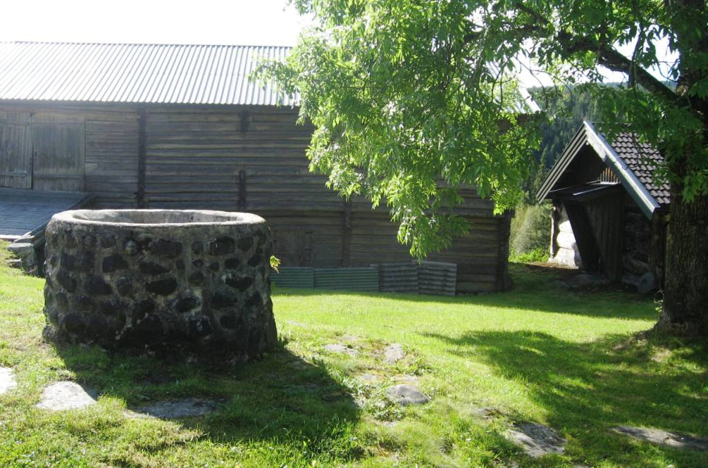 Midtbø in Vinje, home of norwegian novelist Tarjei Vesaas and poet Halldis Moren Vesaas